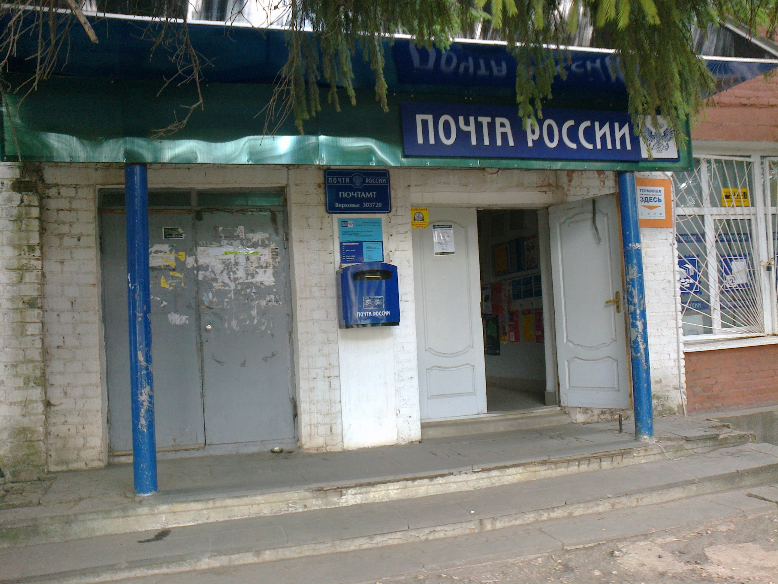 Почтовое отделение посёлка городского типа Верховье, Верховский район, Орловская область